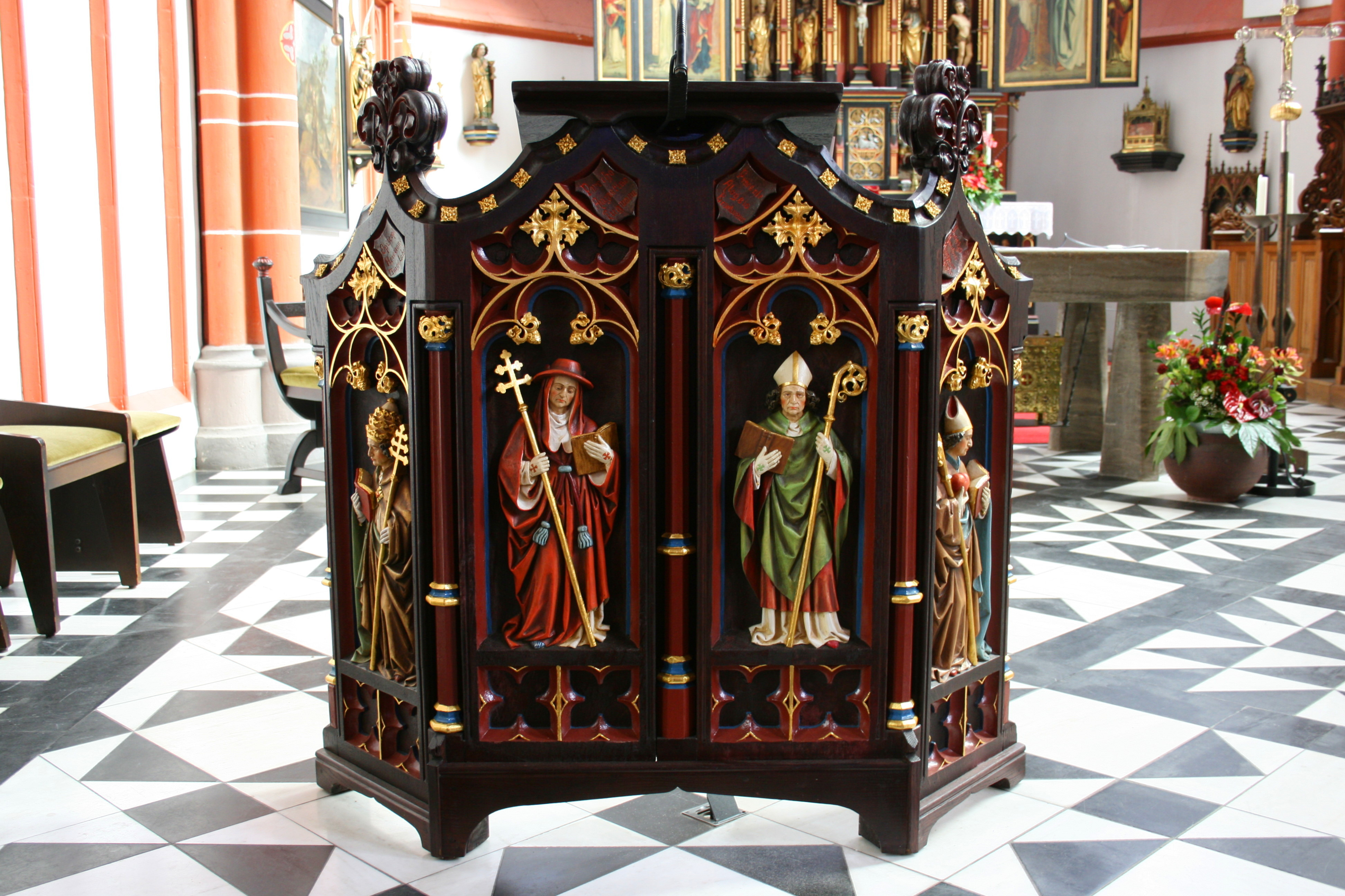 Sankt Peter und Paul in Kranenburg